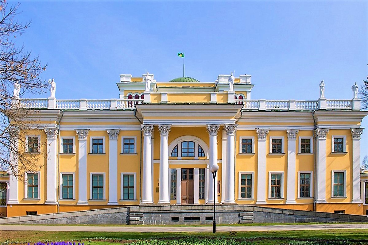 Палацава-паркавы комплекс ў Гомелі. Фасад палаца